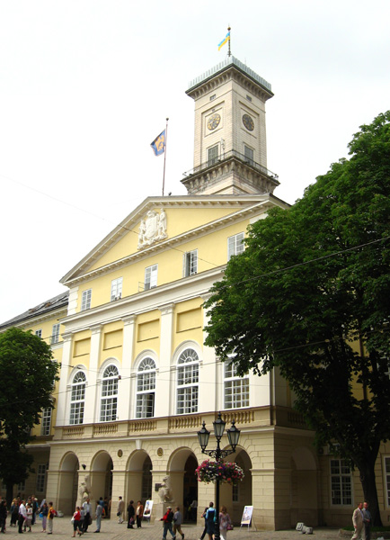 Ратуша во Львове